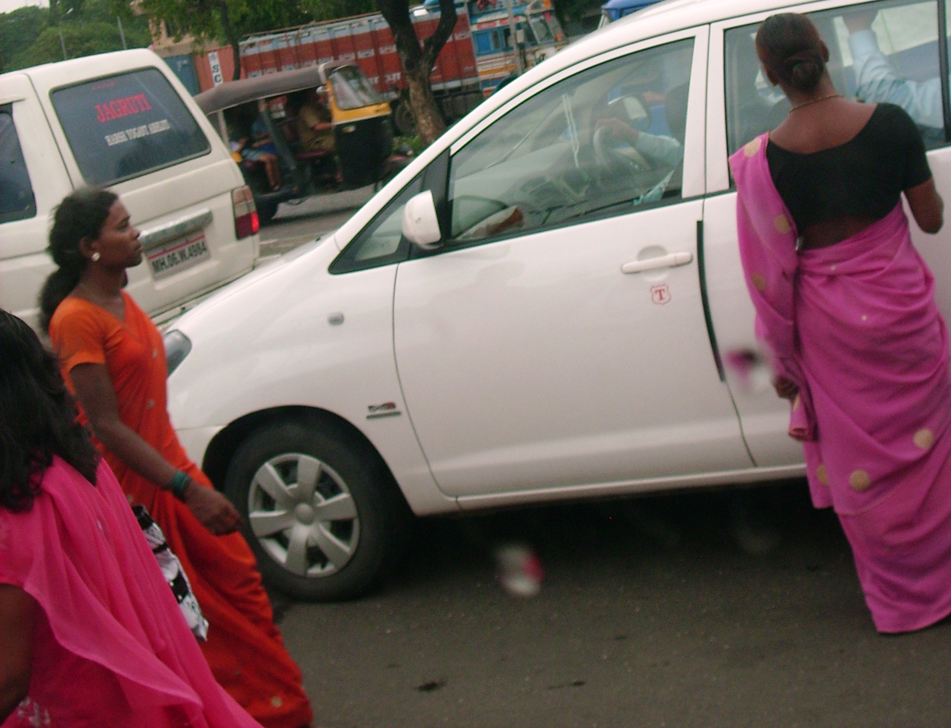 الزي الرسمي للسيدات في الهند من الجانب والخلف